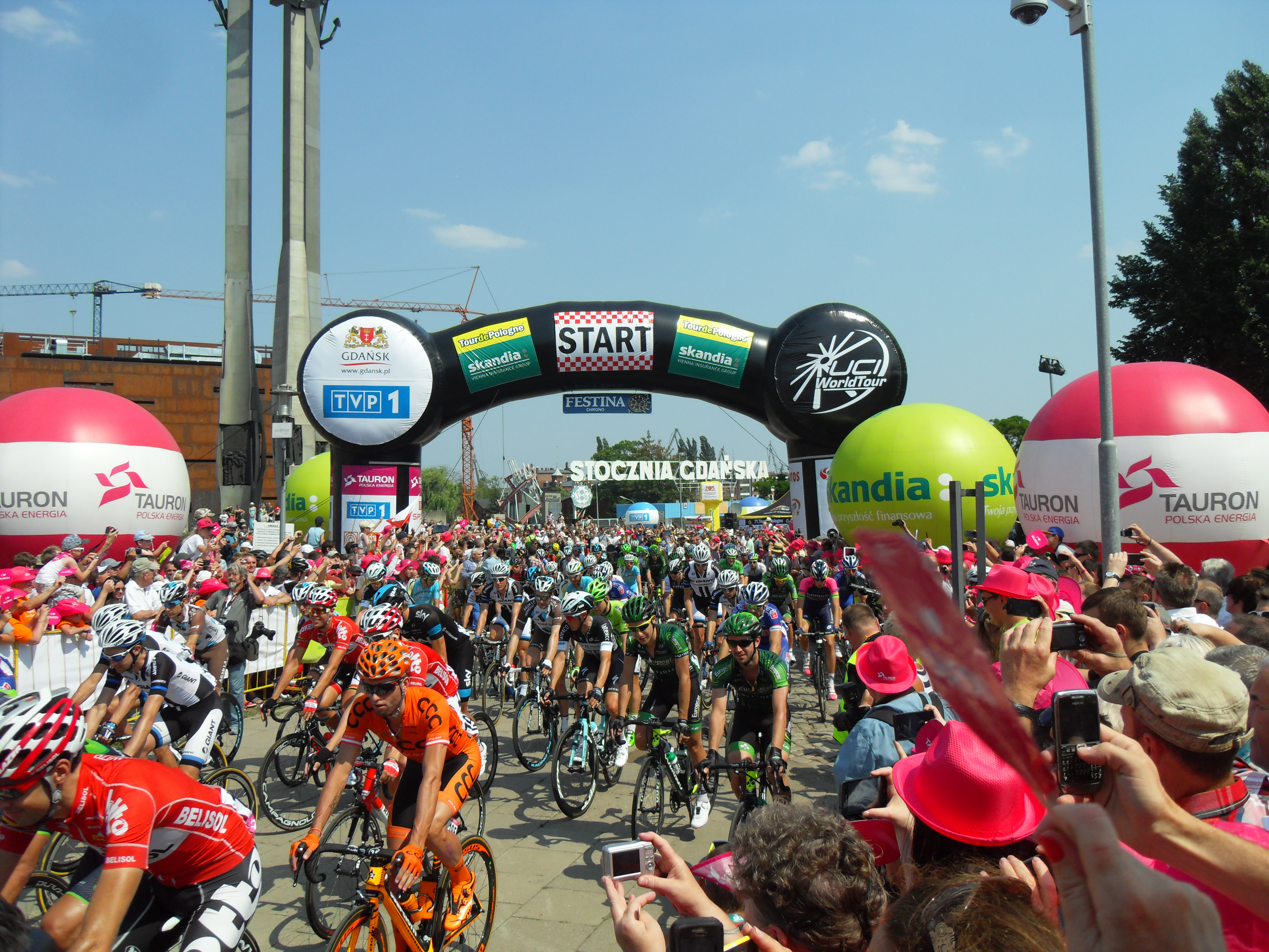 Tour de Pologne 2014 – 1. etap w Gdańsku, pl. Solidarności.